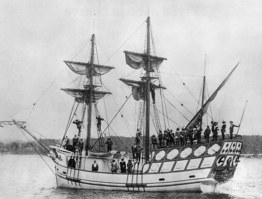 Réplique du Don-de-Dieu au tricentenaire de Québec, 1908, Québec, Québec